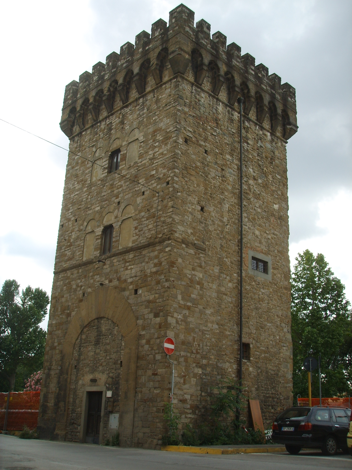 Torre della serpe